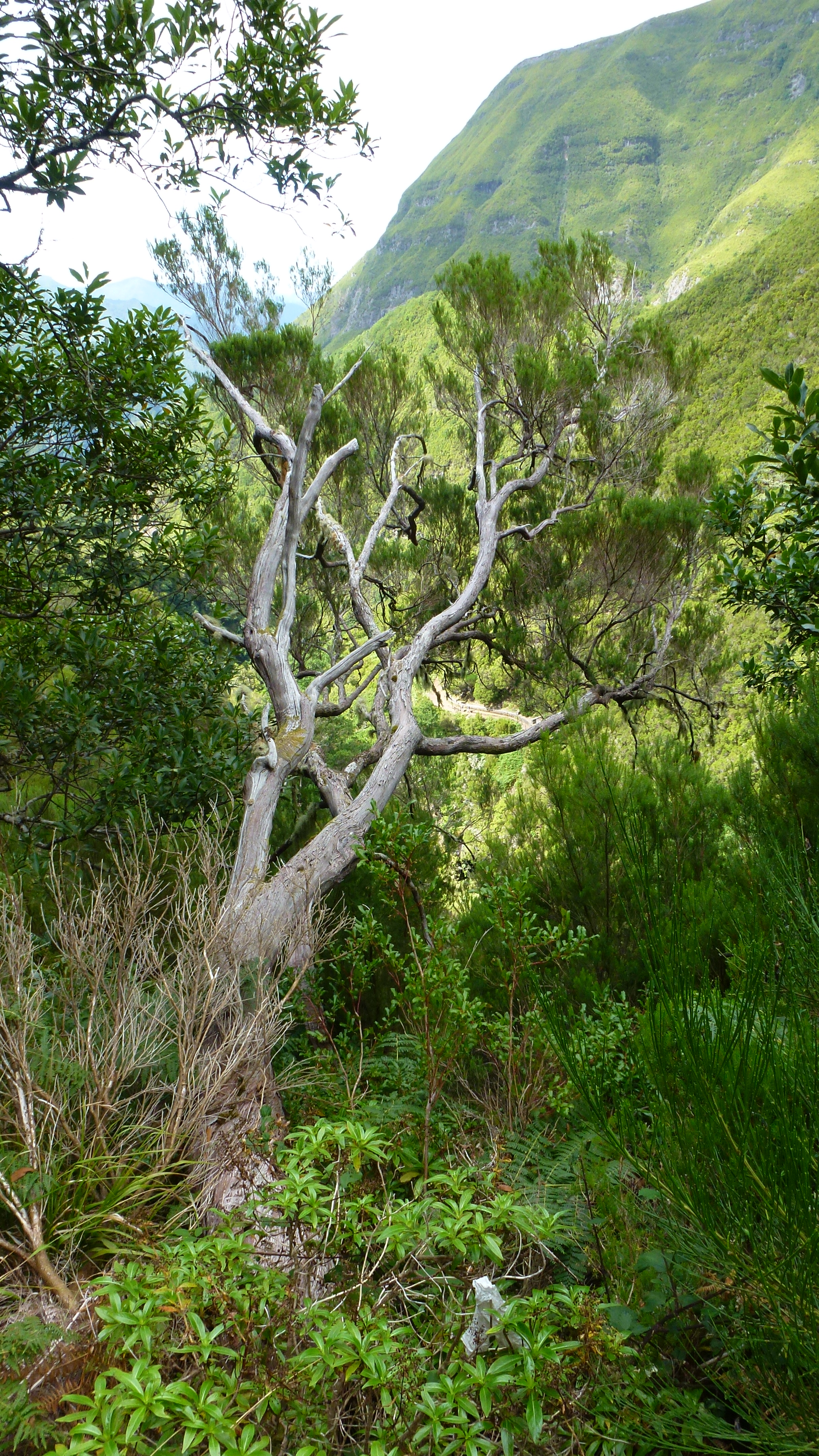 Boomheide, Erica arborea, op Madeira